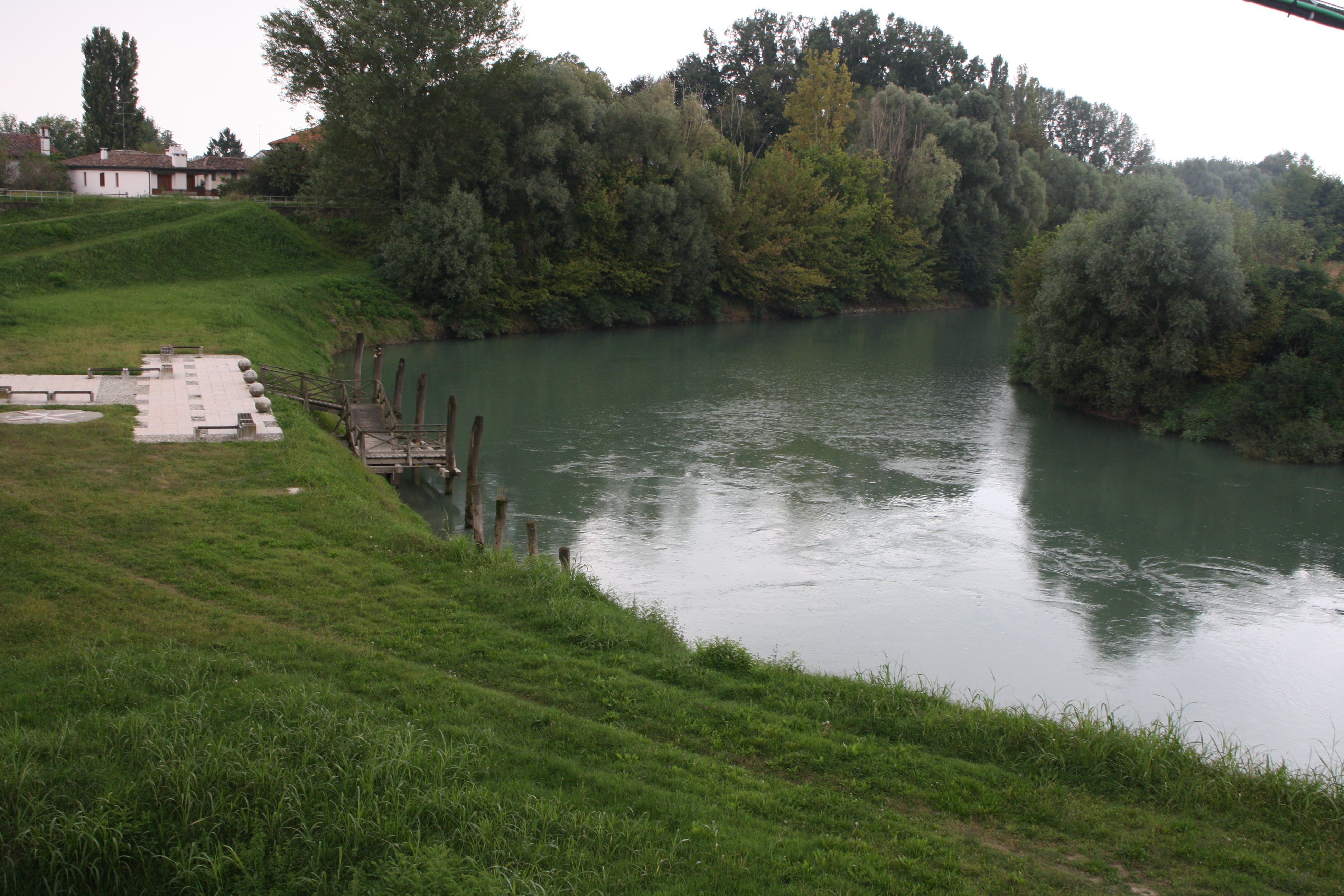 The Livenza River, Meduna di Livenza